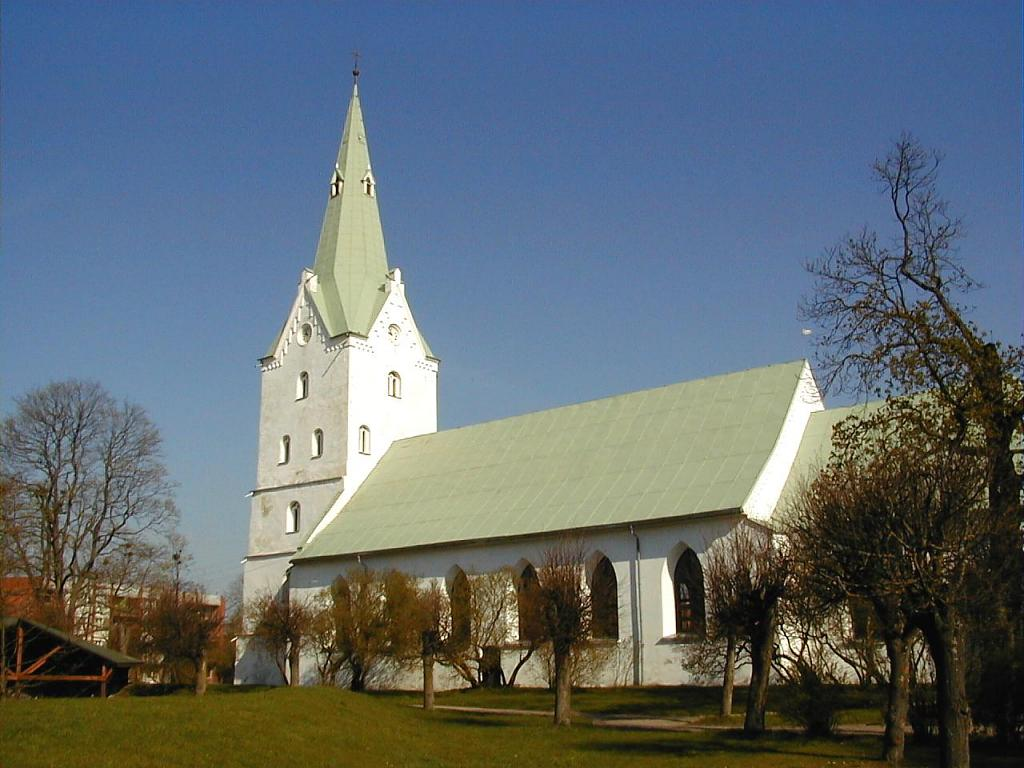 Dobeles luterāņu baznīca 2001-05-01